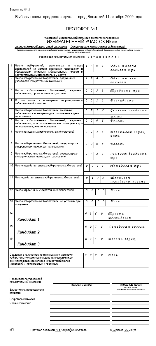 Образец протокола участковой избирательной комиссии